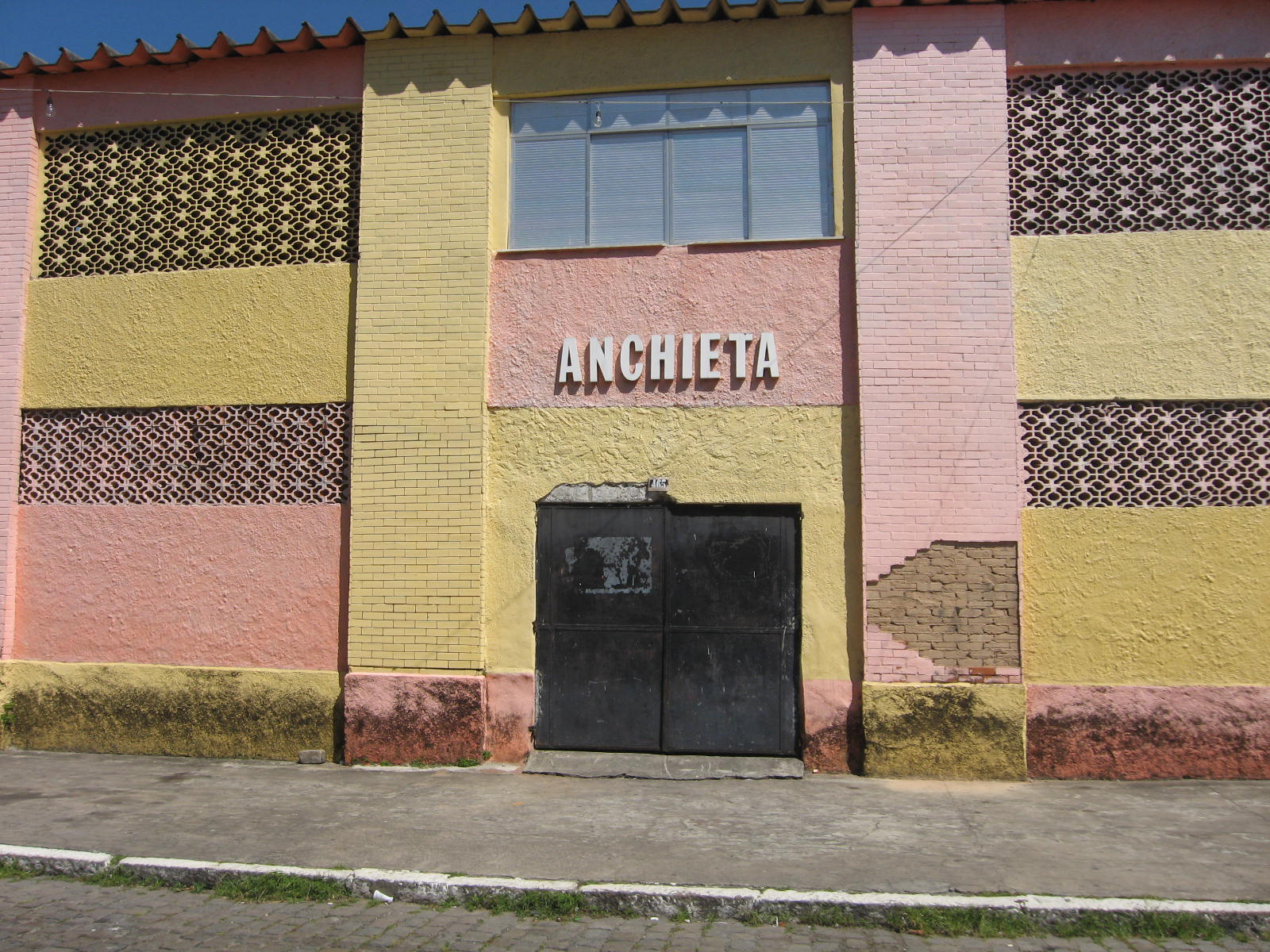 Sede do Esporte Clube Anchieta.